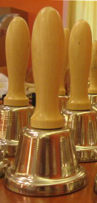 Magyar csengettyű